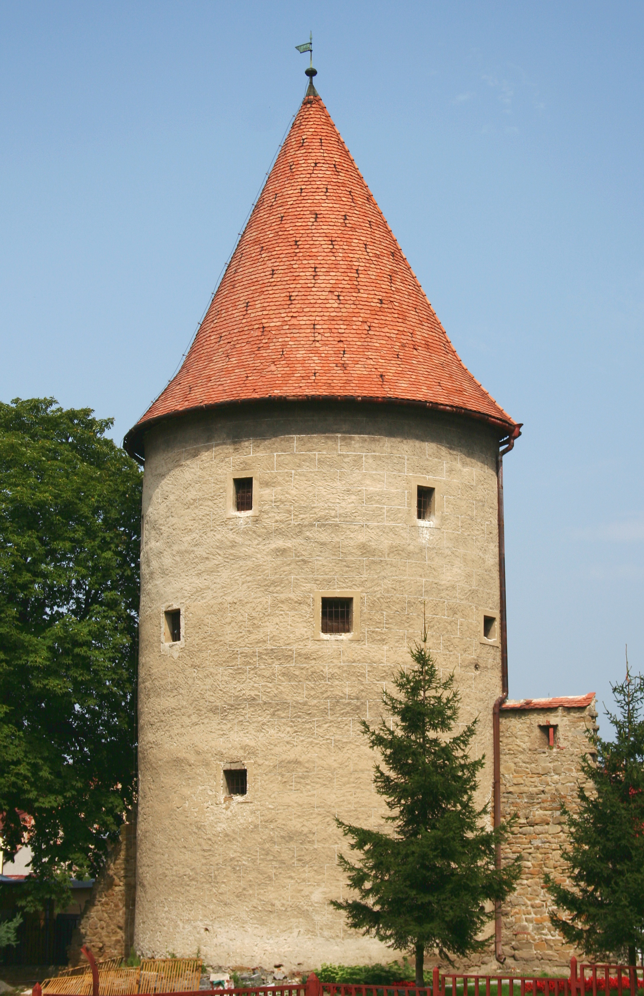 Baszta - fragment starej zabudowy w słowackim mieście Bardejov